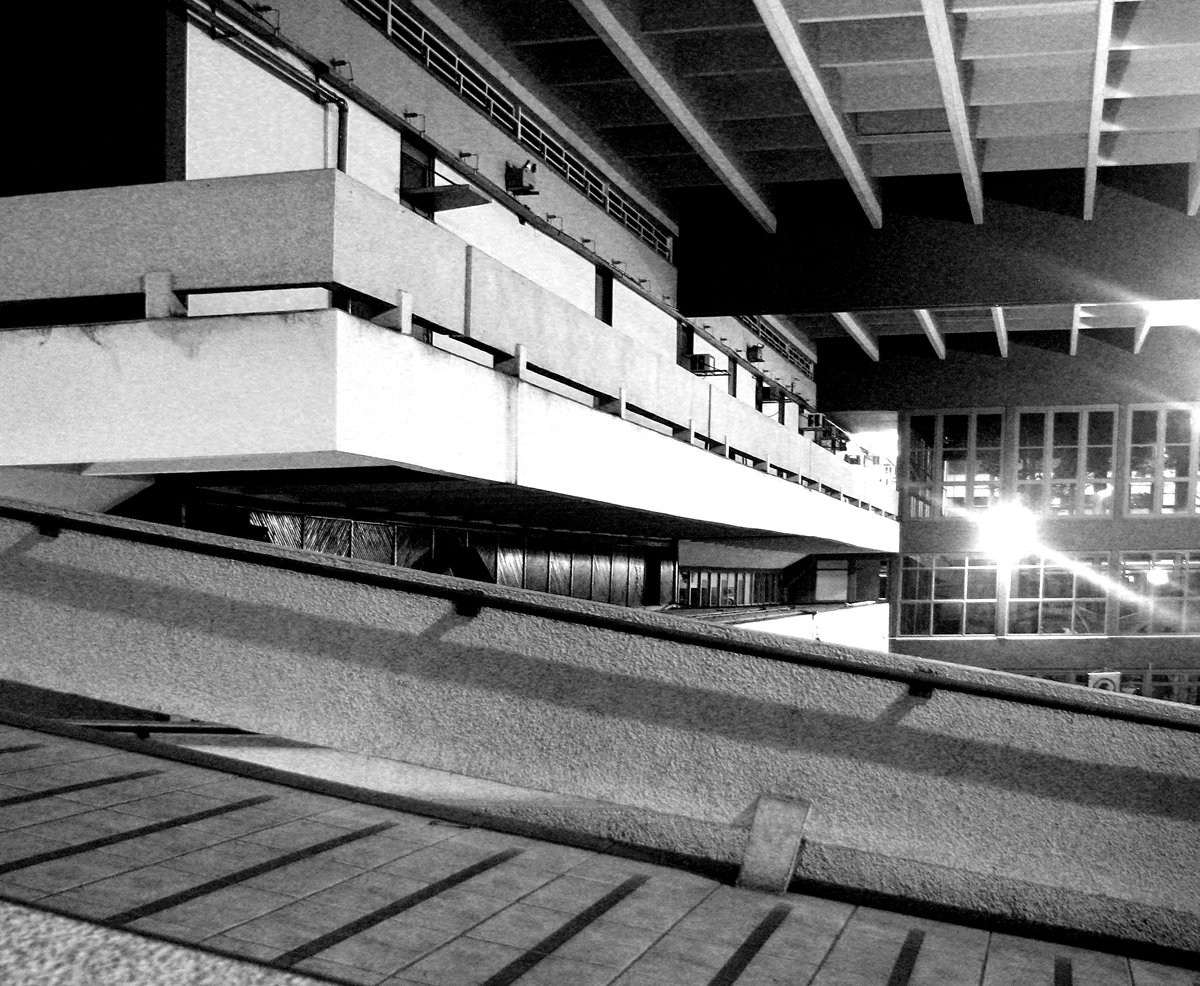 Arquiteto Eduardo Corona